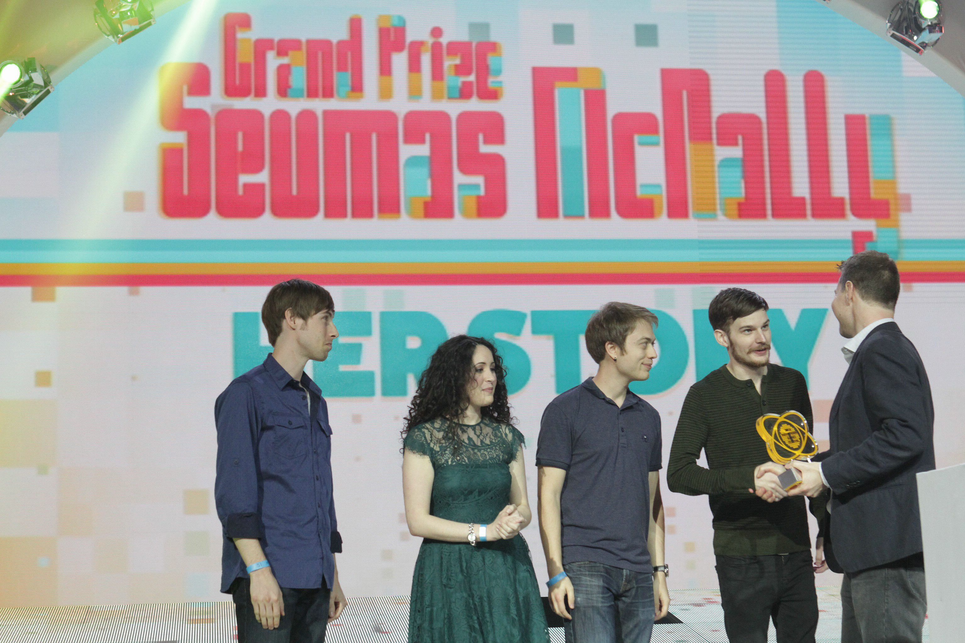 16-19_27_48-01-7D2_0095